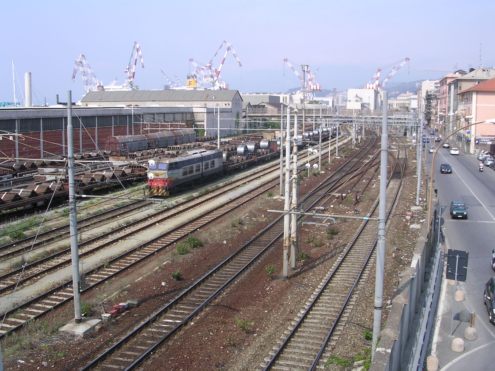 Il parco merci della stazione di Genova Sestri Ponente